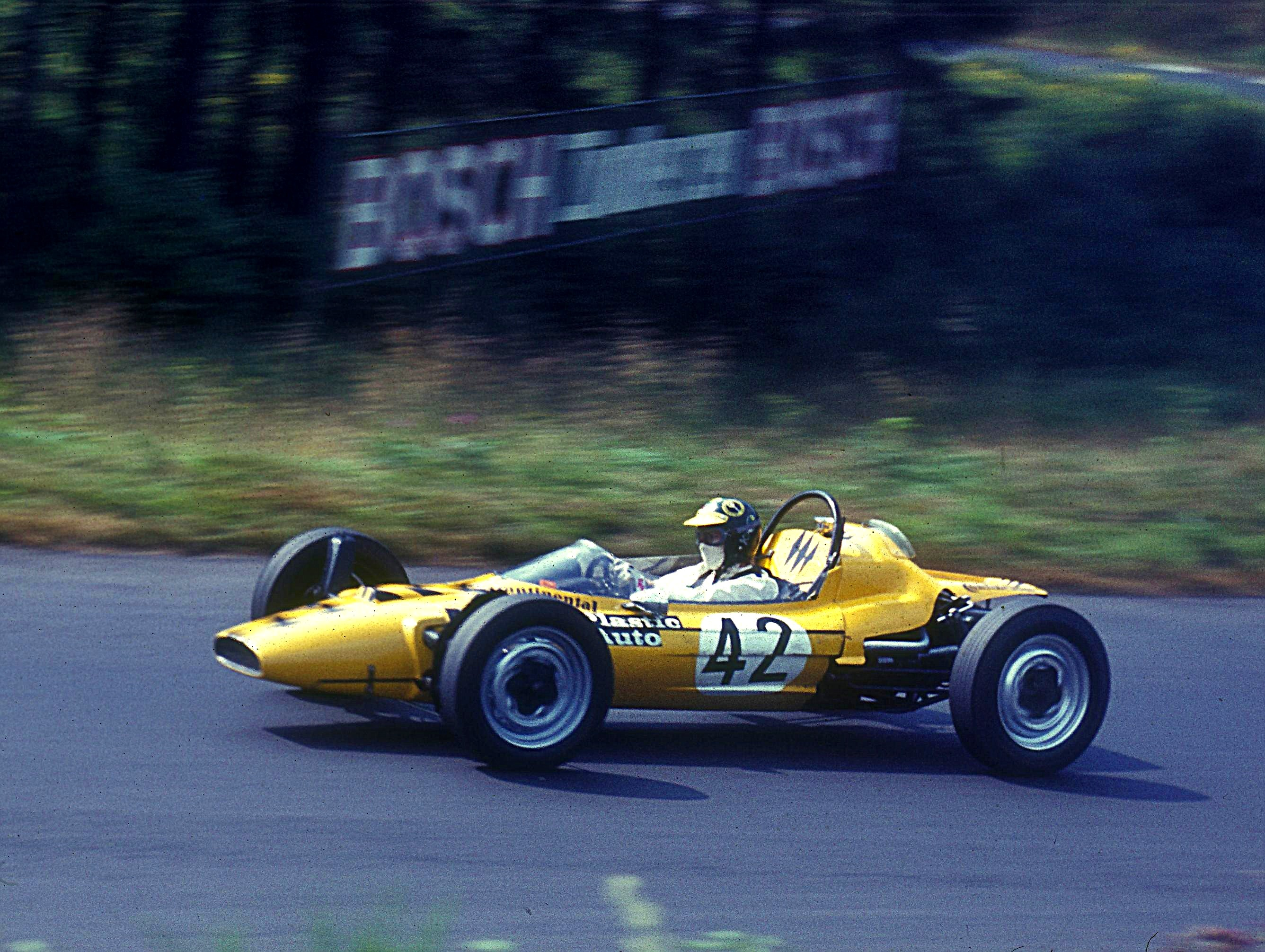 Hannelore Werner im Olympic Formel V auf dem Nürburgring, ausgangs Klostertalkurve, Auffahrt zum Karussell